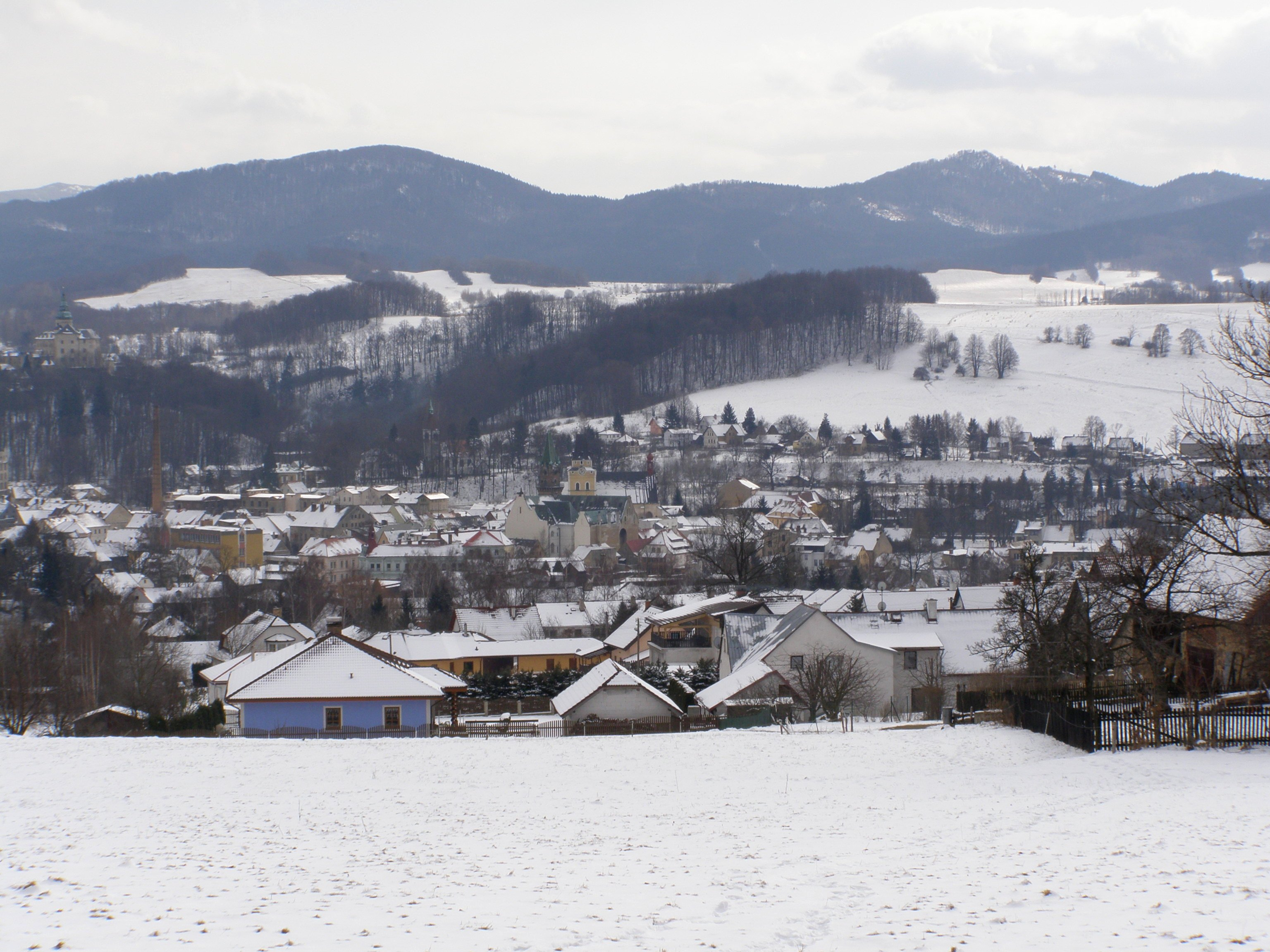 Česky: Frýdlant, pohled ze severu z jižního úbočí vrcholu U Rozhledny (399 m n. m.), zcela v pozadí Jizerské hory